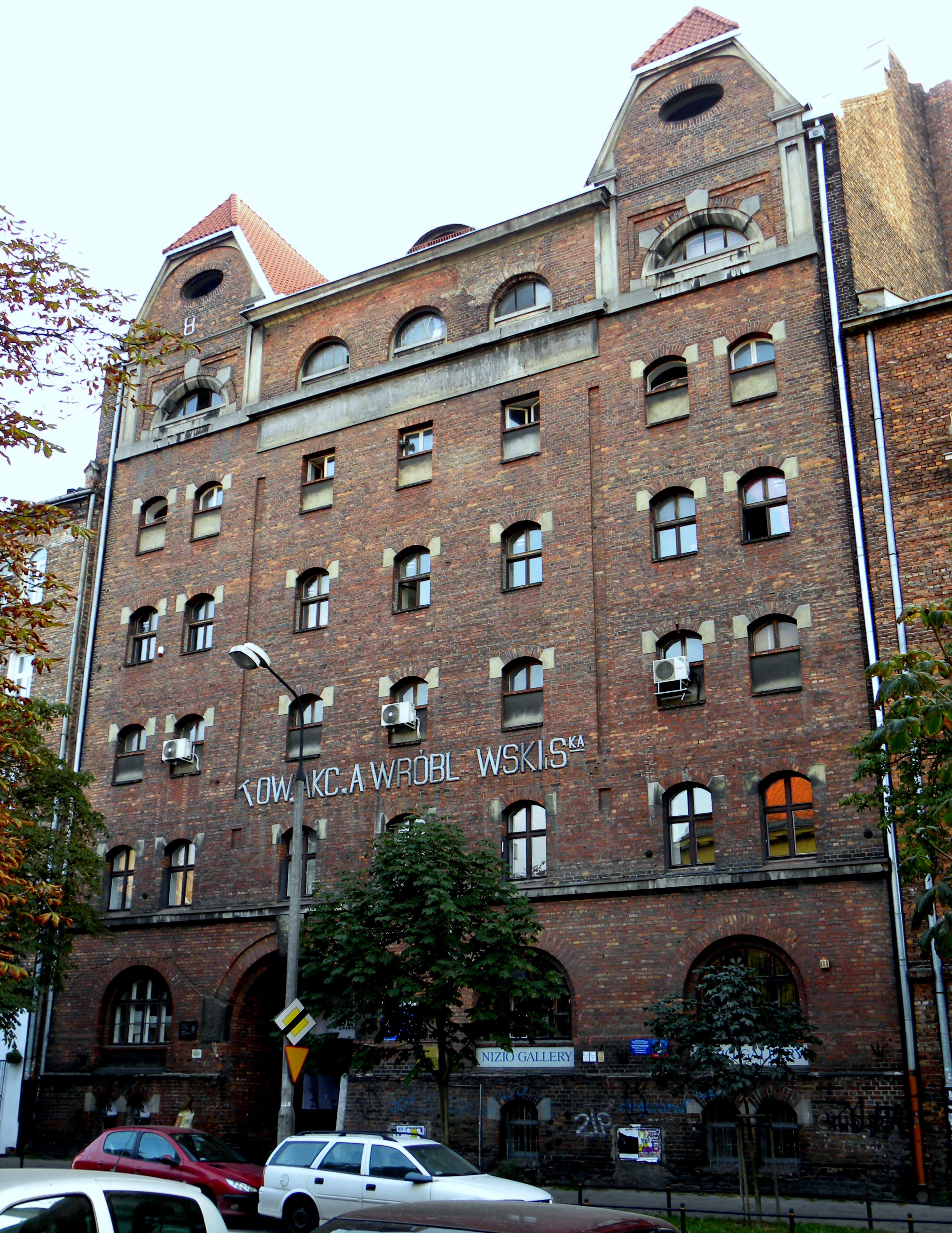 Skład Towarzystwa Akcyjnego A. Wróblewski (4 budynki), 1883-1910 ul. Inżynierska 3, Warszawa, dz. Praga Północ